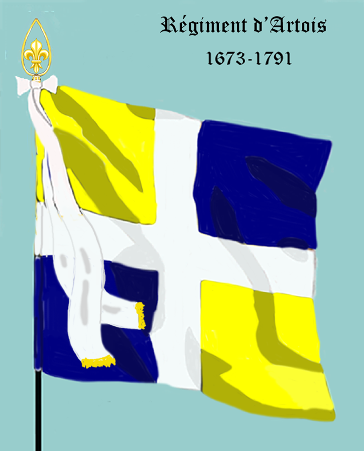 Ordonnanzfahne eines königlich französischen Infanterie-Regiments. - Entnommen und überarbeitet aus: „LES UNIFORMES ET LES DRAPEAUX DE L'ARMÉE DU ROI“ Marseille 1899. (Drapeau d'Ordonnance d' un régiment française d'infanterie royale.)